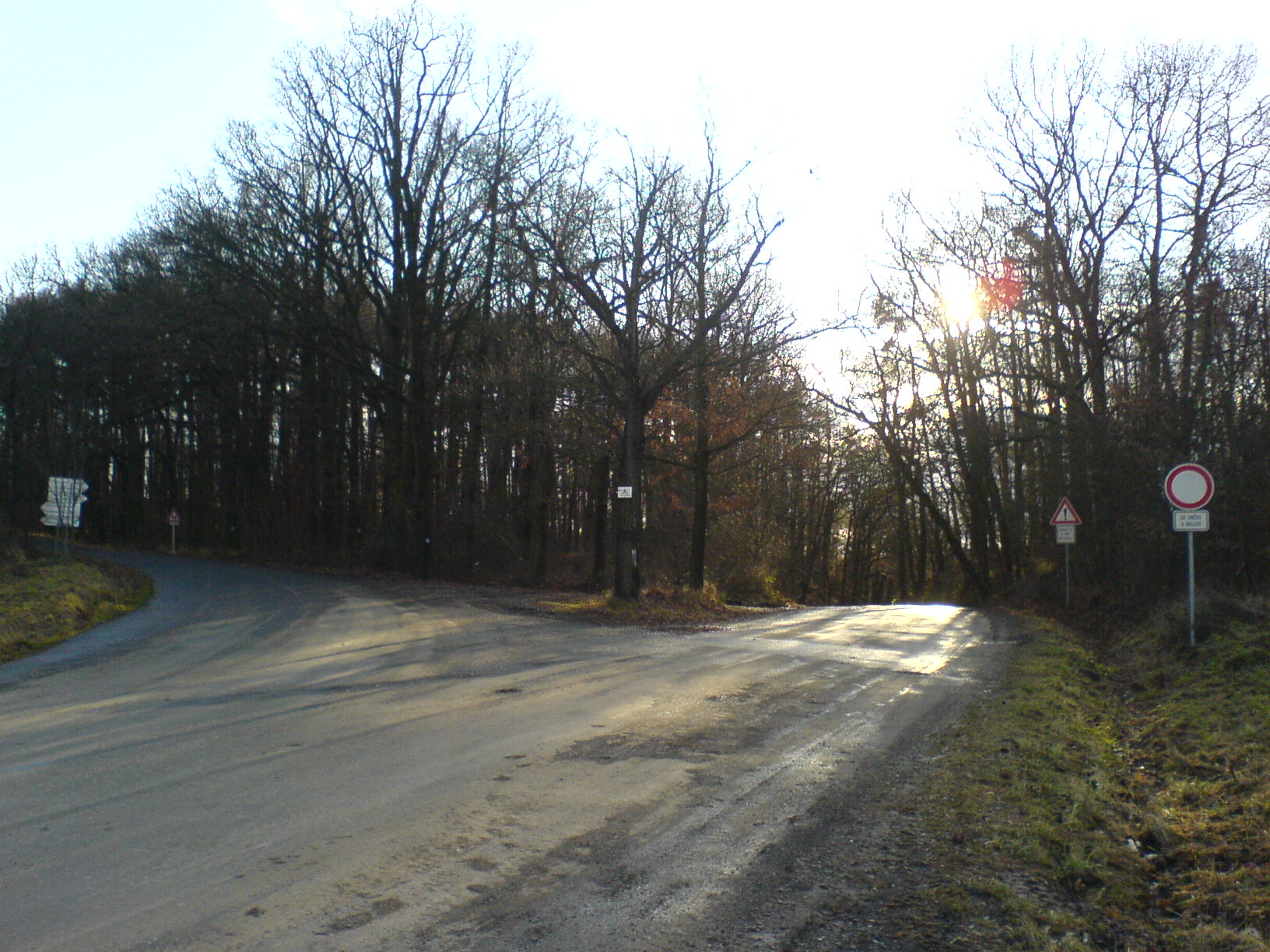 Housinské sedlo